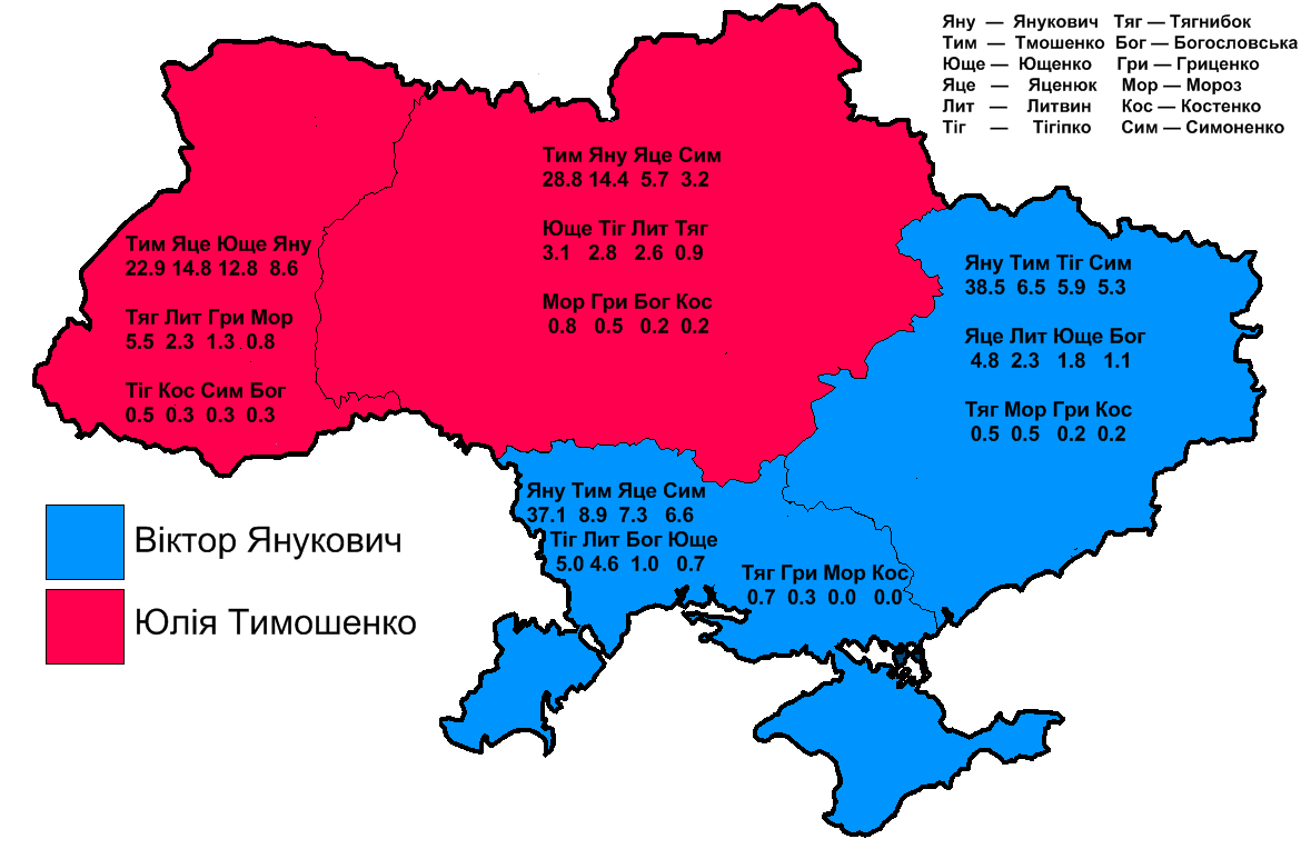 Апытваньне Цэнтру Разумкова наконт выбараў Прэзыдэнта Ўкраіны 2010